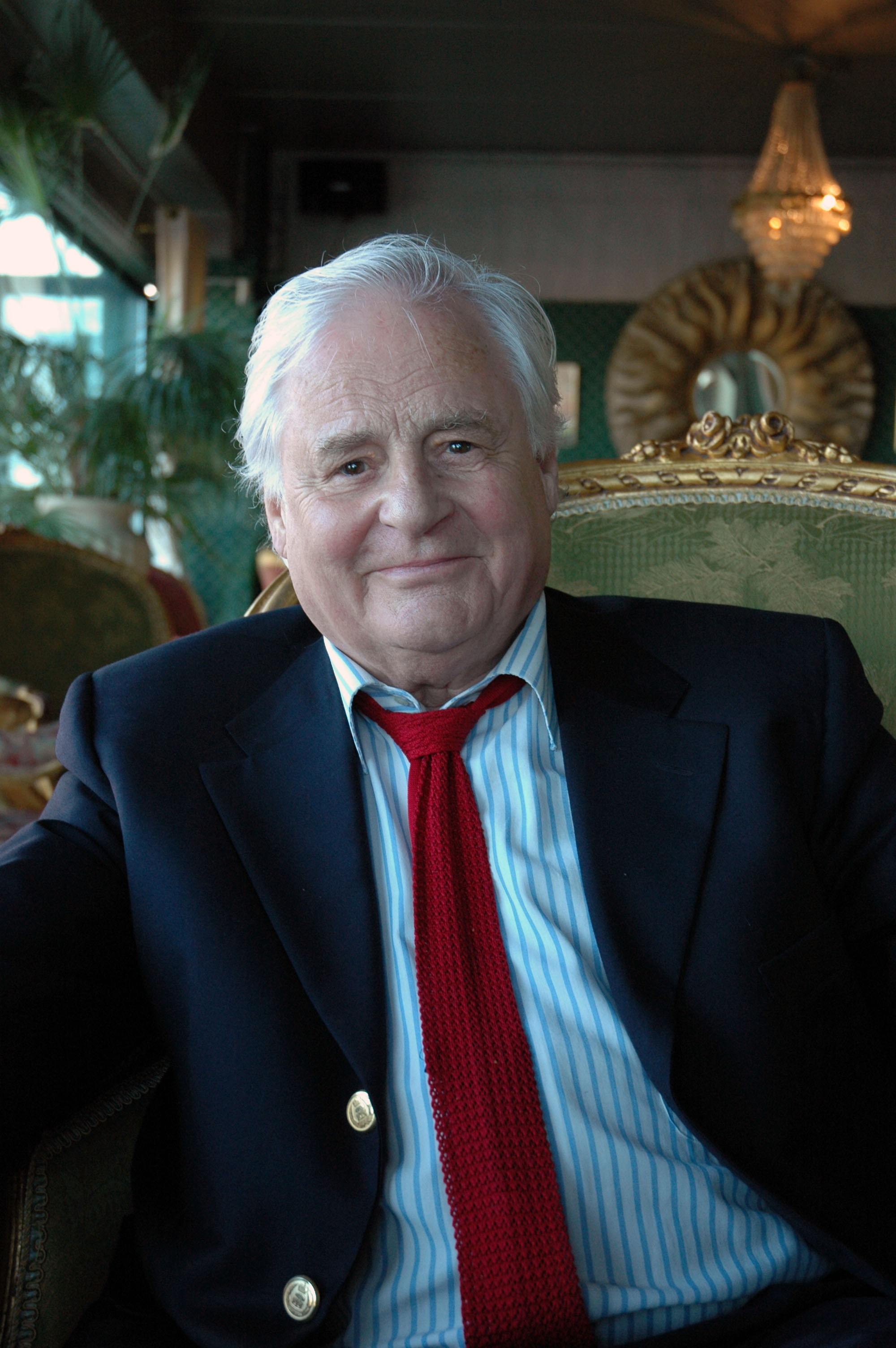 Foto speciaal voor Wikipedia gemaakt door schoonzoon van de auteur